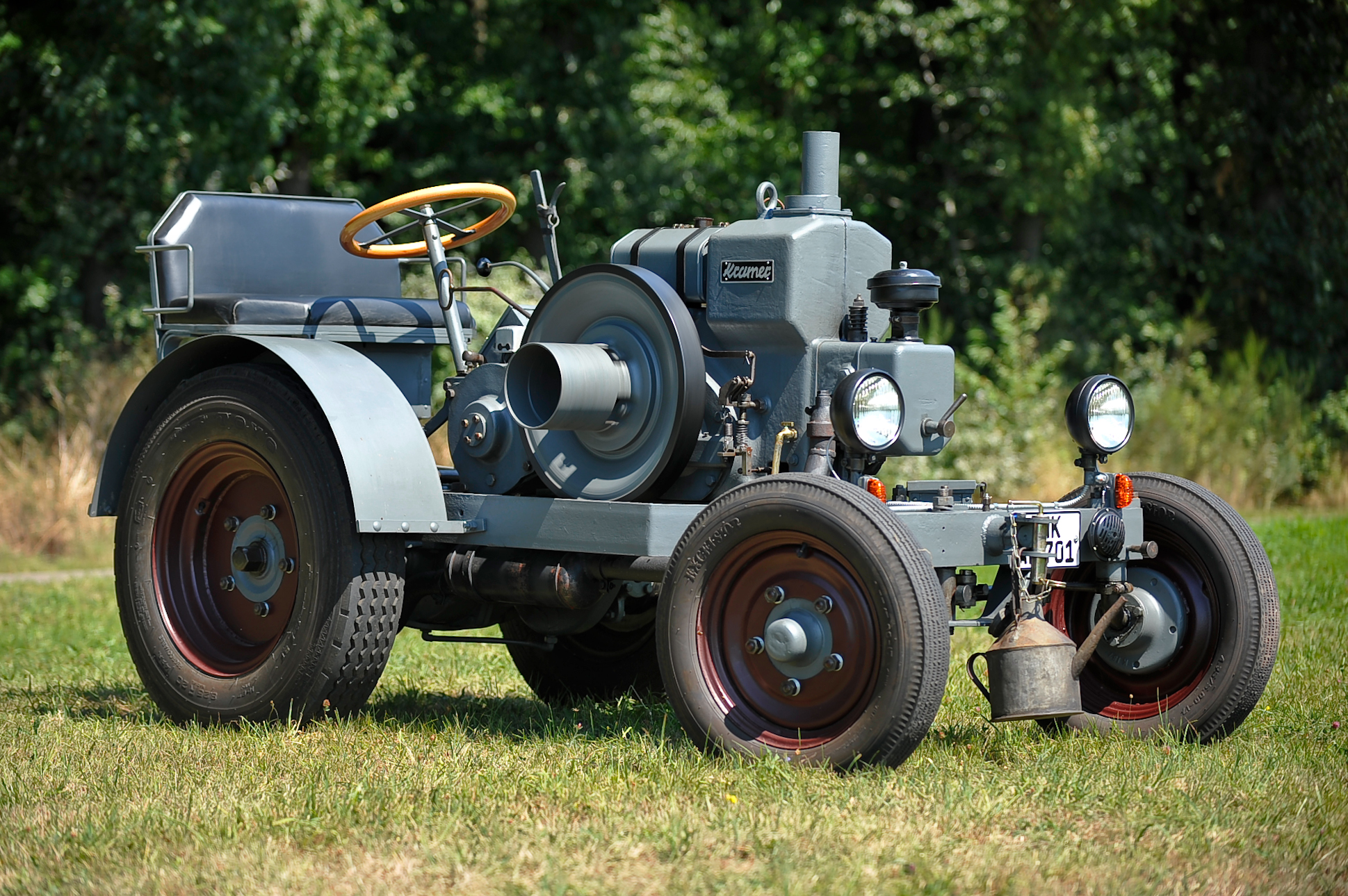 Kramer-Traktor, Typ: K18, Baujahr: 1937, Leistung: 16 PS, Hubraum: 1628 cm2